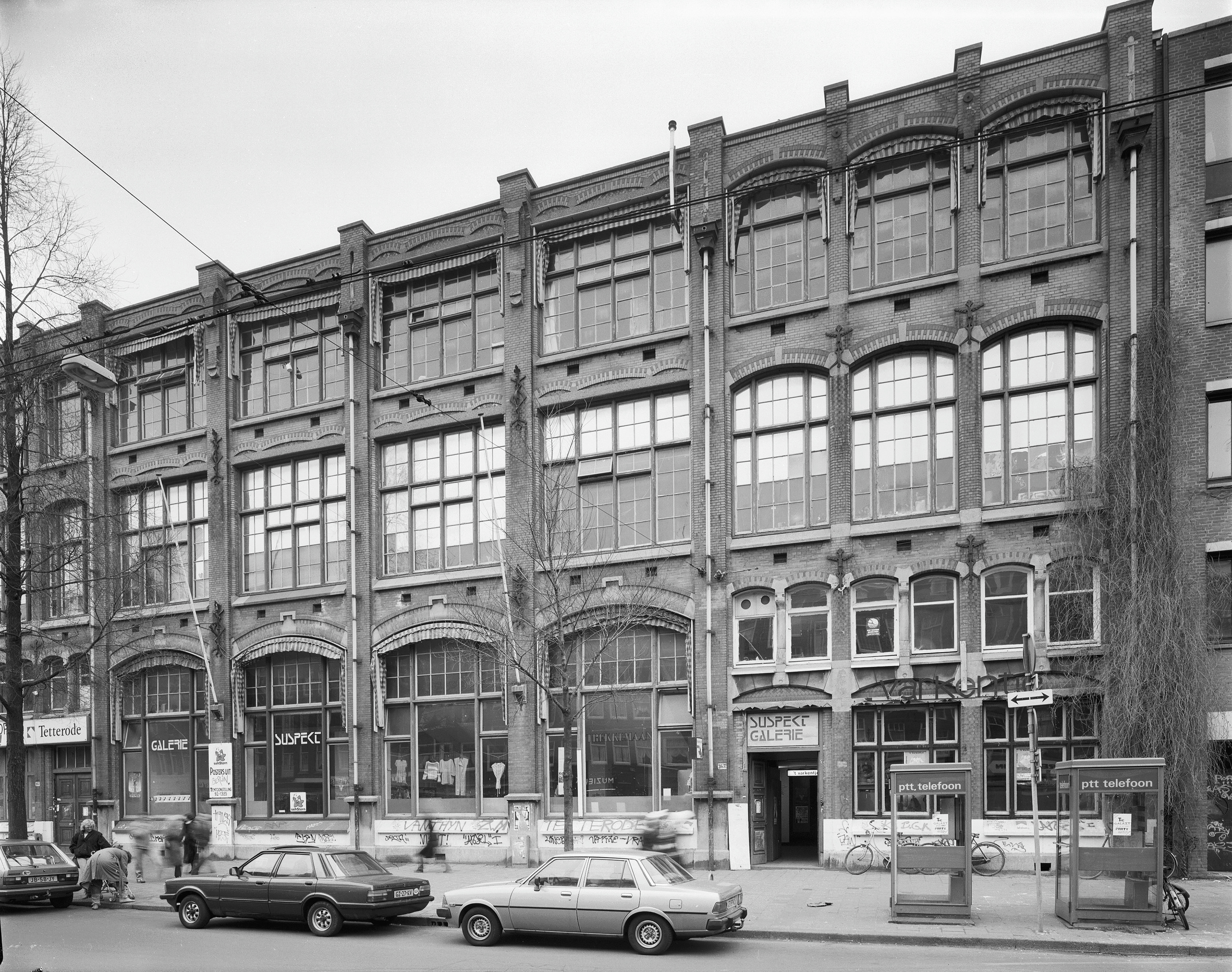 Tetterode Complex: gevel aan de Bilderdijkstraat